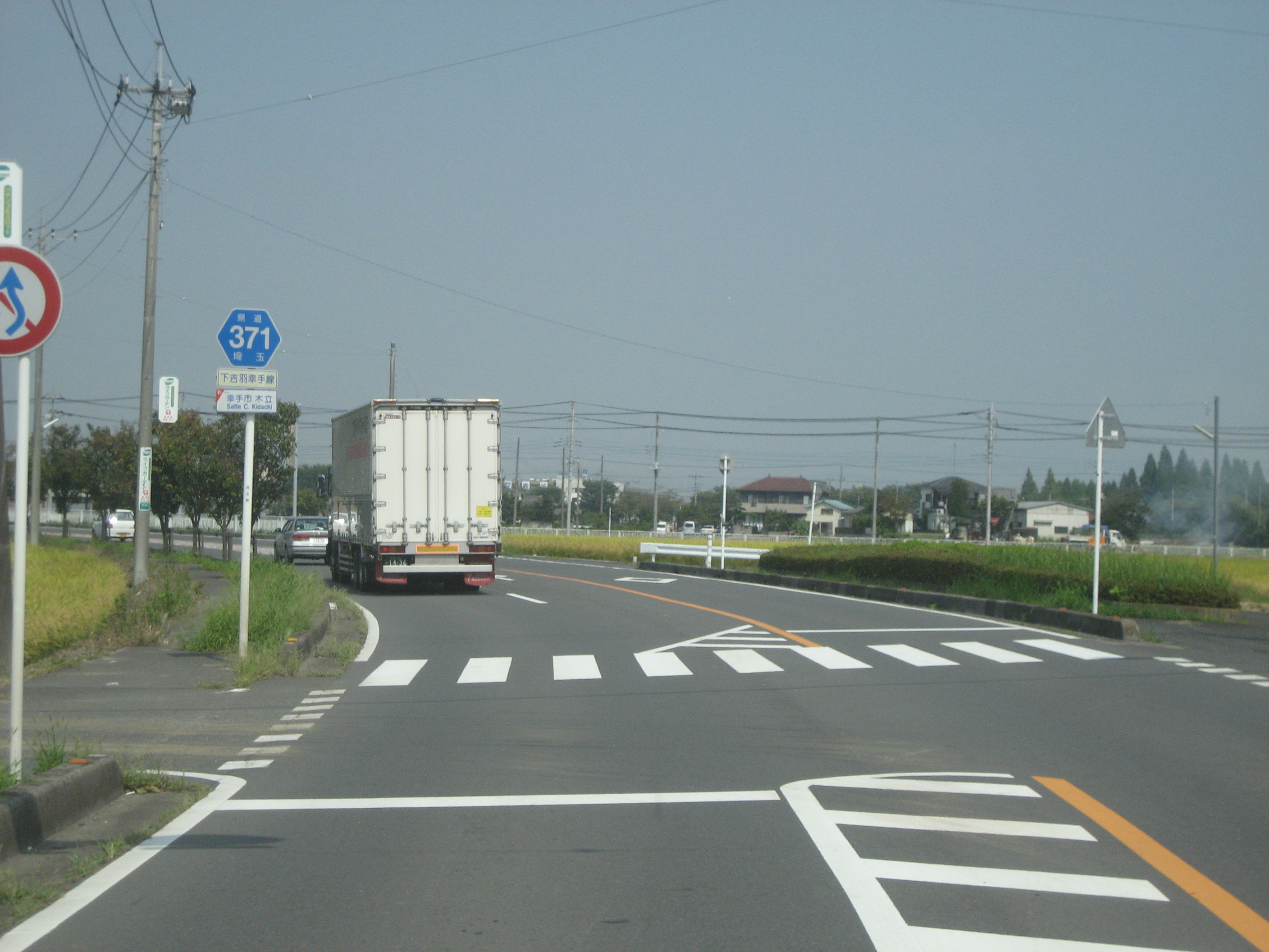 埼玉県道371号線幸手市内